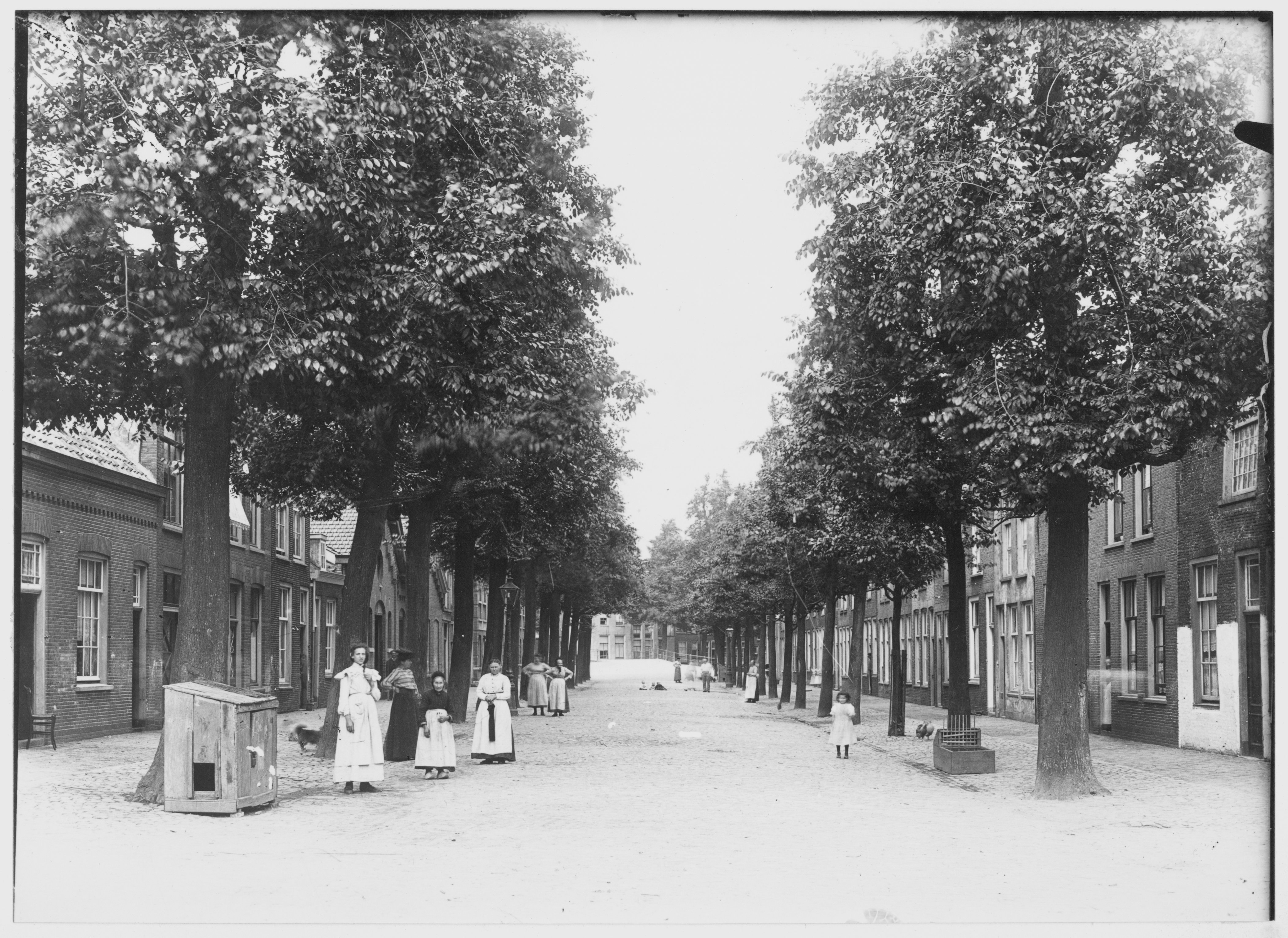 Geregracht gezien van de 4e Binnenvestgracht / Kalverstraatje naar het Levendaal. Met vrouwen links, kippenhokken en Nieuwebrug op de achtergrond.